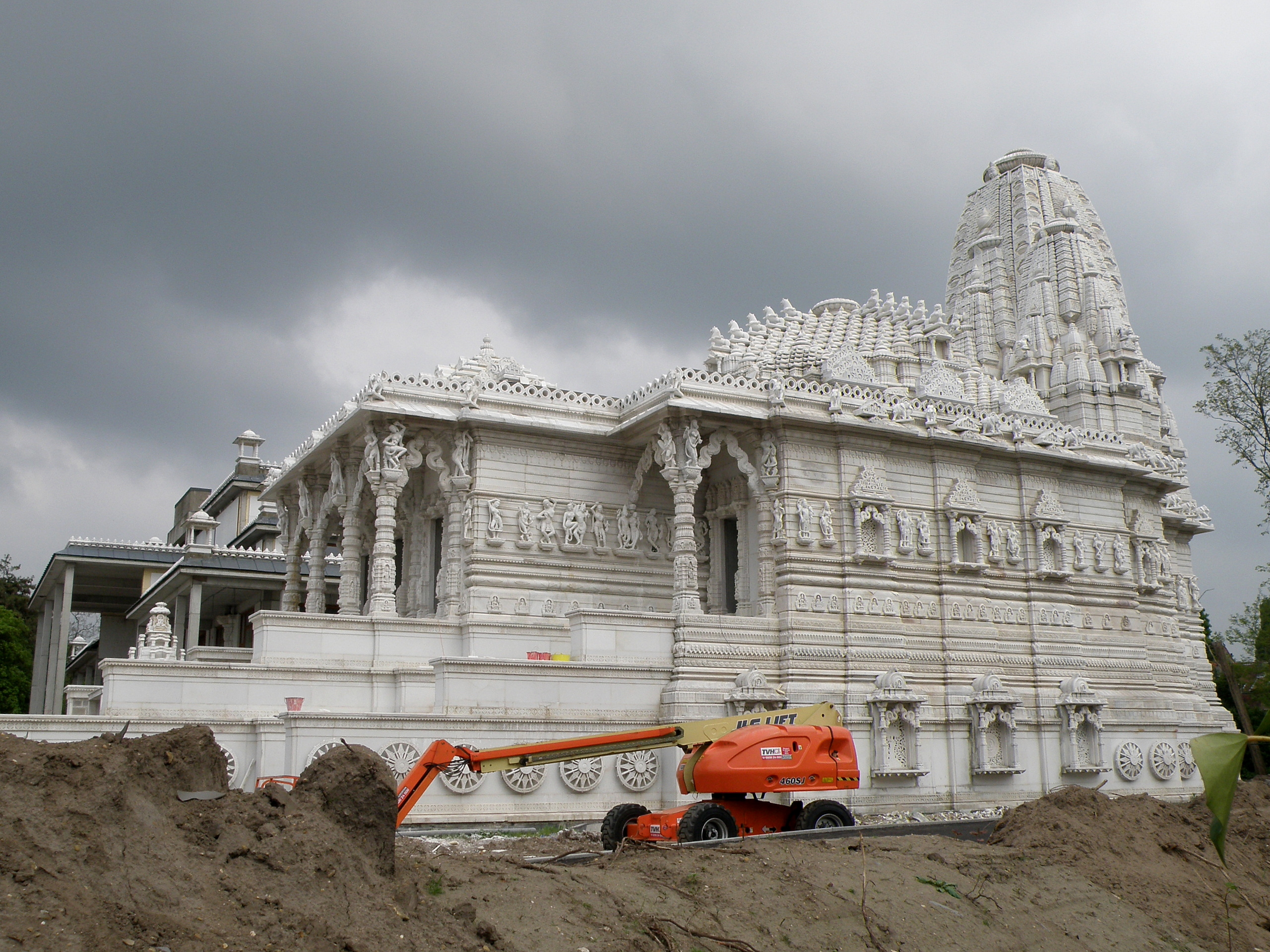 Antwerpen, district Wilrijk. Jaïn-tempel aan de Laarstraat.